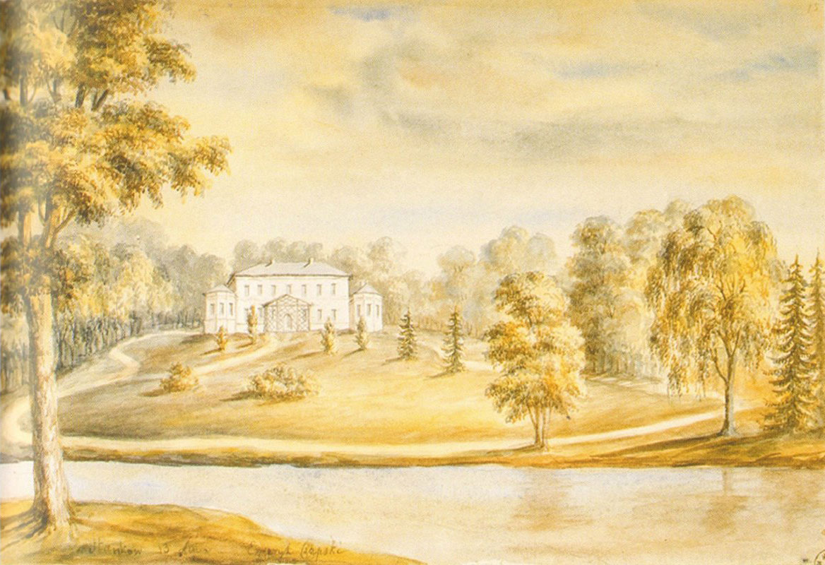 Беларуская (тарашкевіца): Станькаў (Stańkaŭ), сядзіба Чапскіх (Čapski)